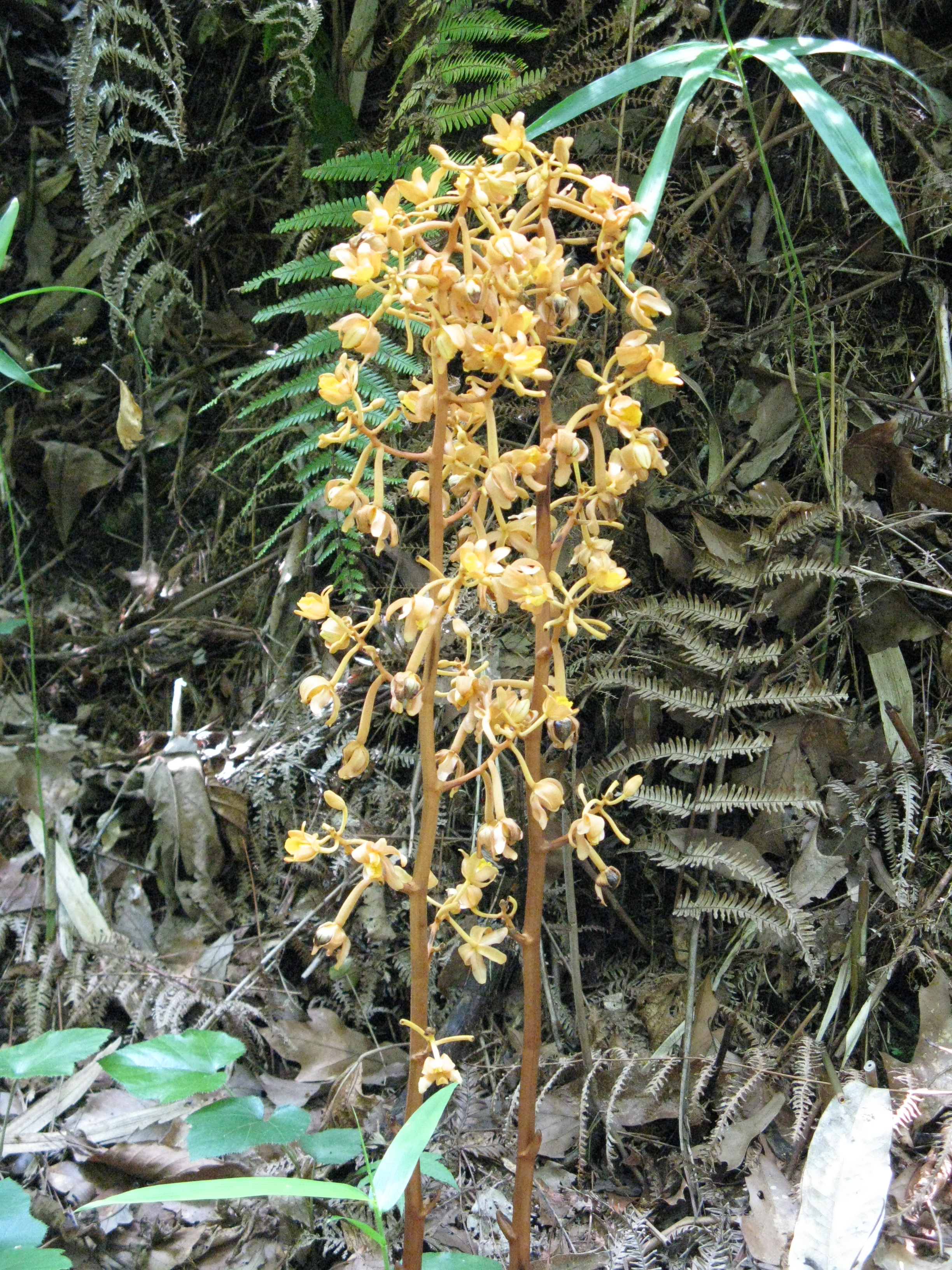 Scientific name Galeola septentrionalis